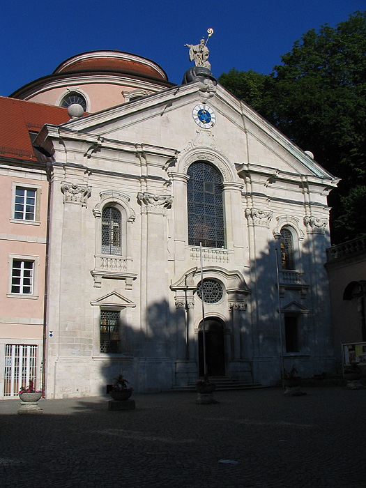 Kloster Weltenburg/ Monastery Weltenburg Bayern, Deutschland / Bavaria, Germany